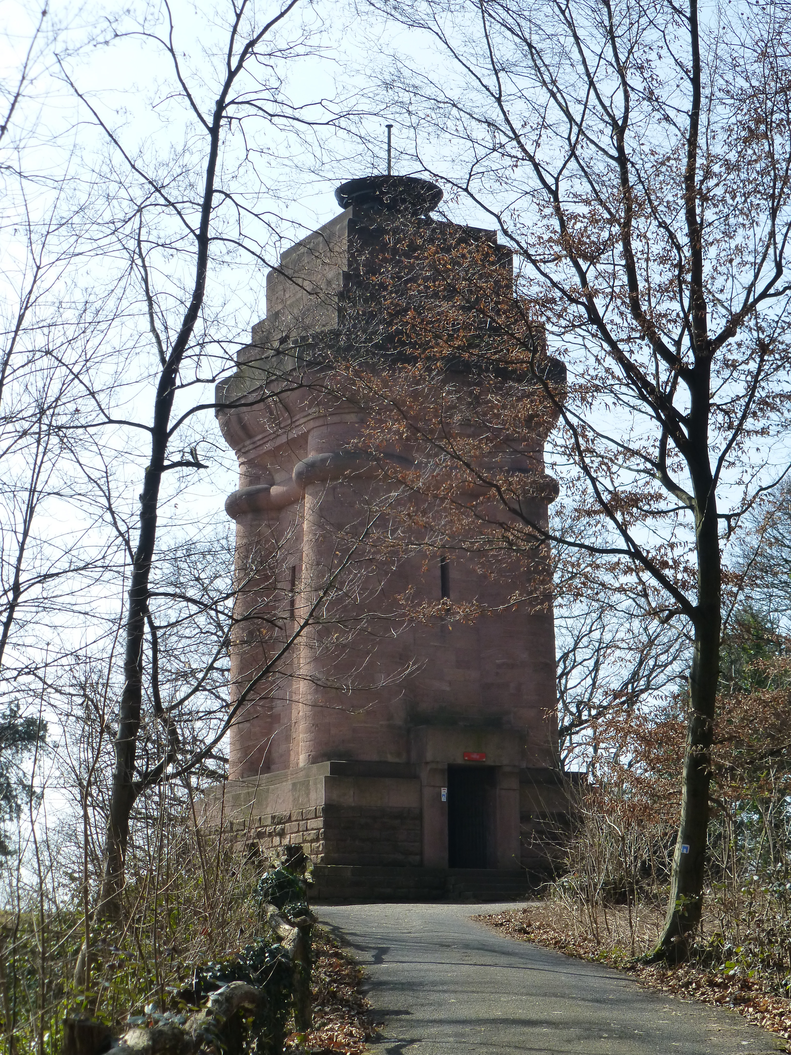 Bismarcksäule am Heiligenberg in Heidelberg